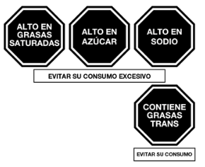 Imagen de los octógonos de advertencia que se muestran en Perú por ley de alimentación saludable (oficialmente: Ley de Promoción de Alimentación Saludable para Niños, Niñas y Adolescentes).